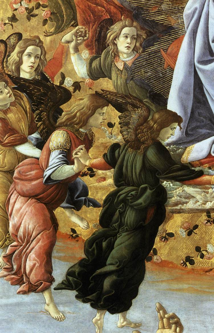 BOTTICELLI, Sandro Coronation of the Virgin (San Marco Altarpiece) Tempera on panel, 378 x 258 cm Galleria degli Uffizi, Florence